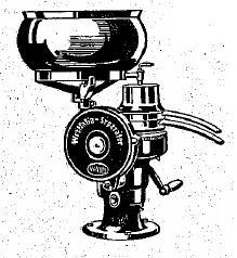 Westfalia separator Kjelde: Westfalia Gebrauchs-Anweisung (ca. 1930-35) Westfalia har gitt løyve til bruk av teikningane: sie können die drei Bilder von Westfalia Separator in dem Arktikel verwenden. / Mit freundlichen Grüßen / i. A.Christiane Lohmüller / Westfalia Separator AG / Corporate Communications